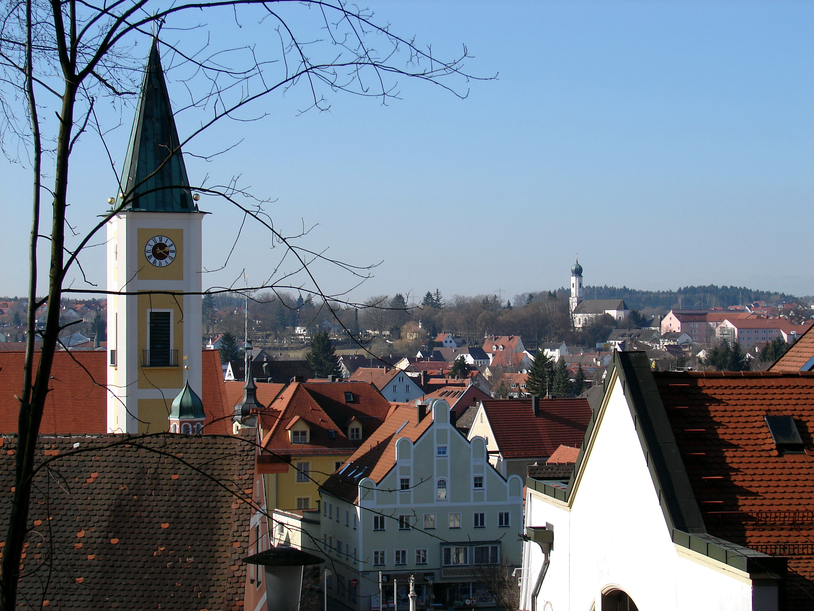 Blick auf Mainburg vom Salvatorberg